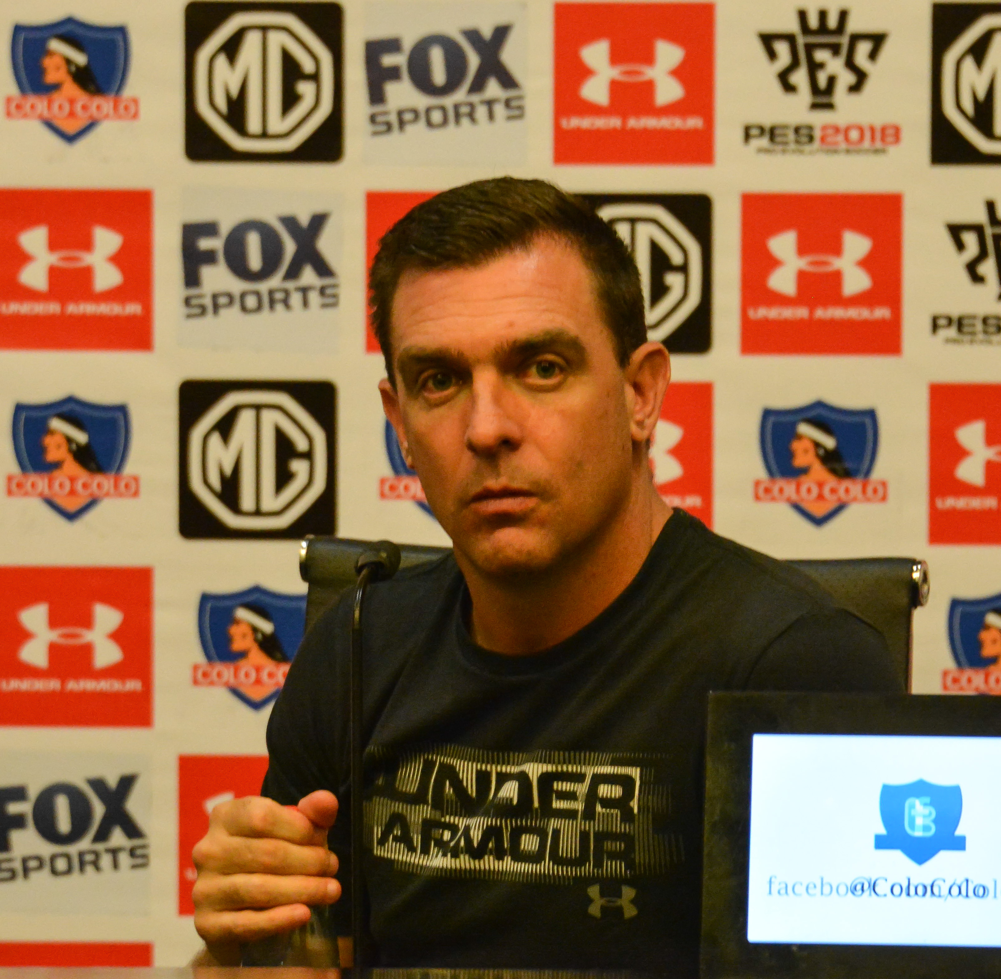 Pablo Guede, Colo Colo v Huachipato, Estadio Monumental, Santiago, Chile.